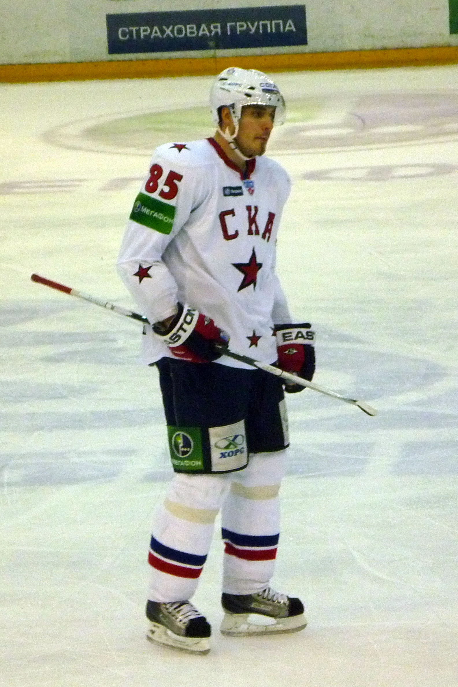 Защитник питерского СКА Юхан Франссон в матче против нижегородского «Торпедо» 12 декабря 2010